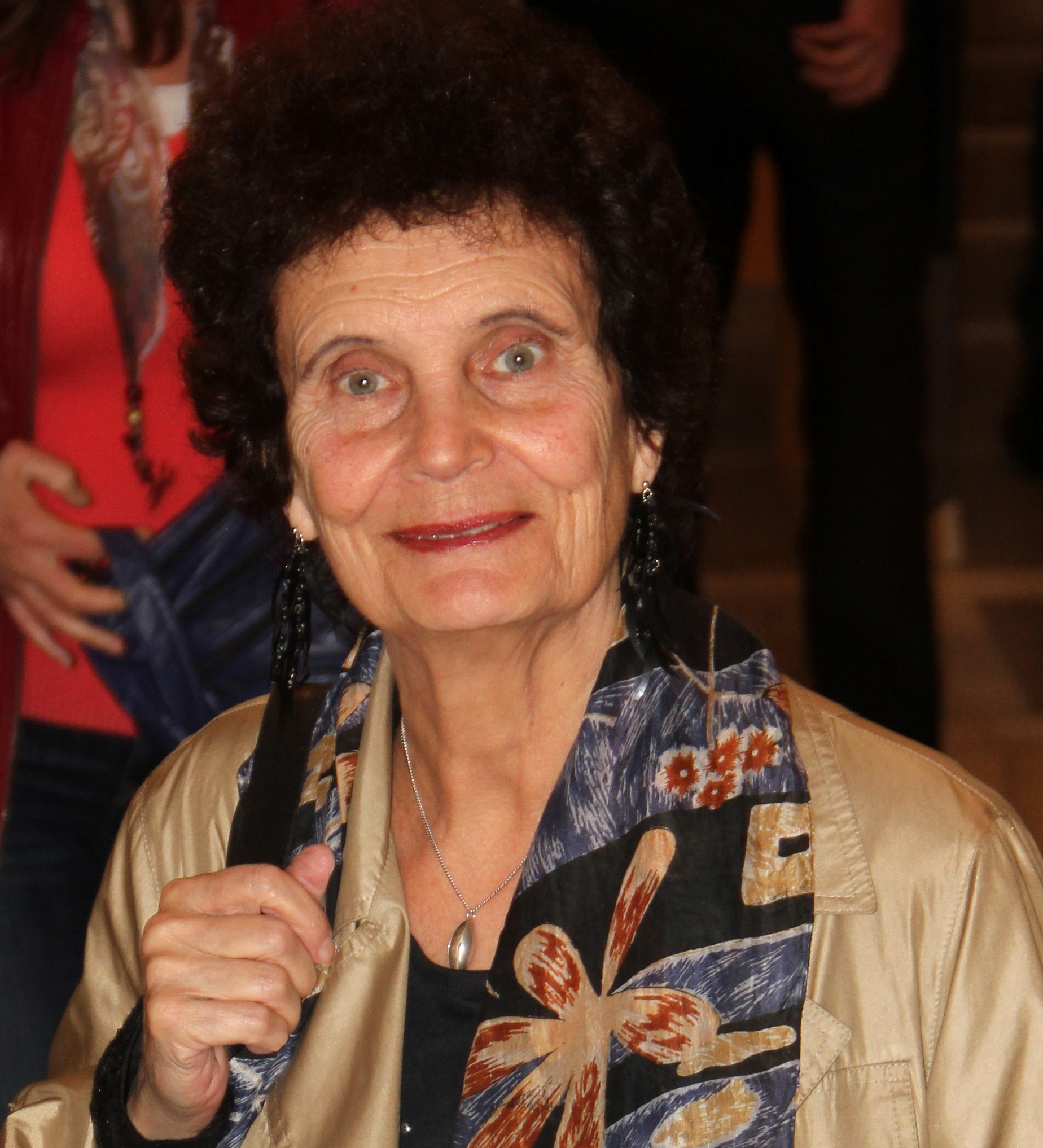 Anja Breien, 19. Uçan Süpürge Uluslararası Kadın Filmleri Festivali’nde. (Ankara, Türkiye, 2016)